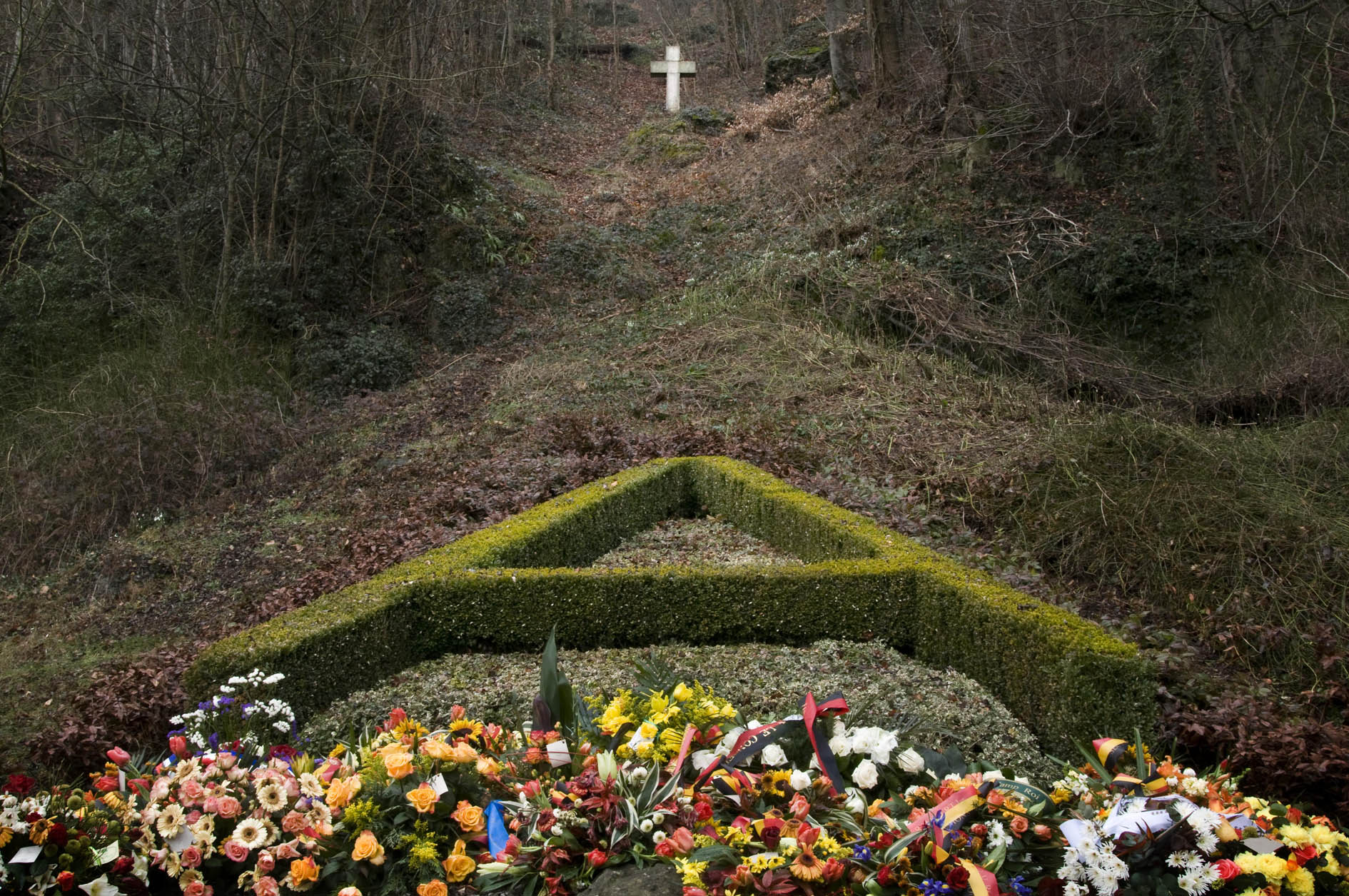 Monument aan de voet van de rotsen in Marche-les-Dames (Namen) waar op 17 februari 1934 Albert I van België te pletter stortte.